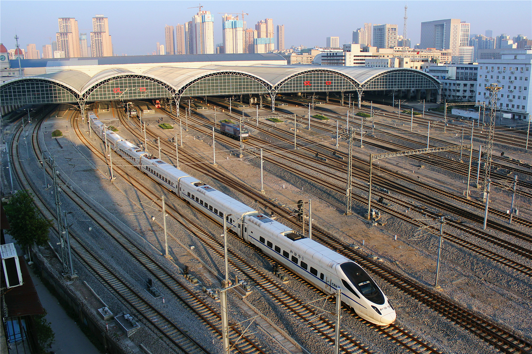 汉口站西侧股道